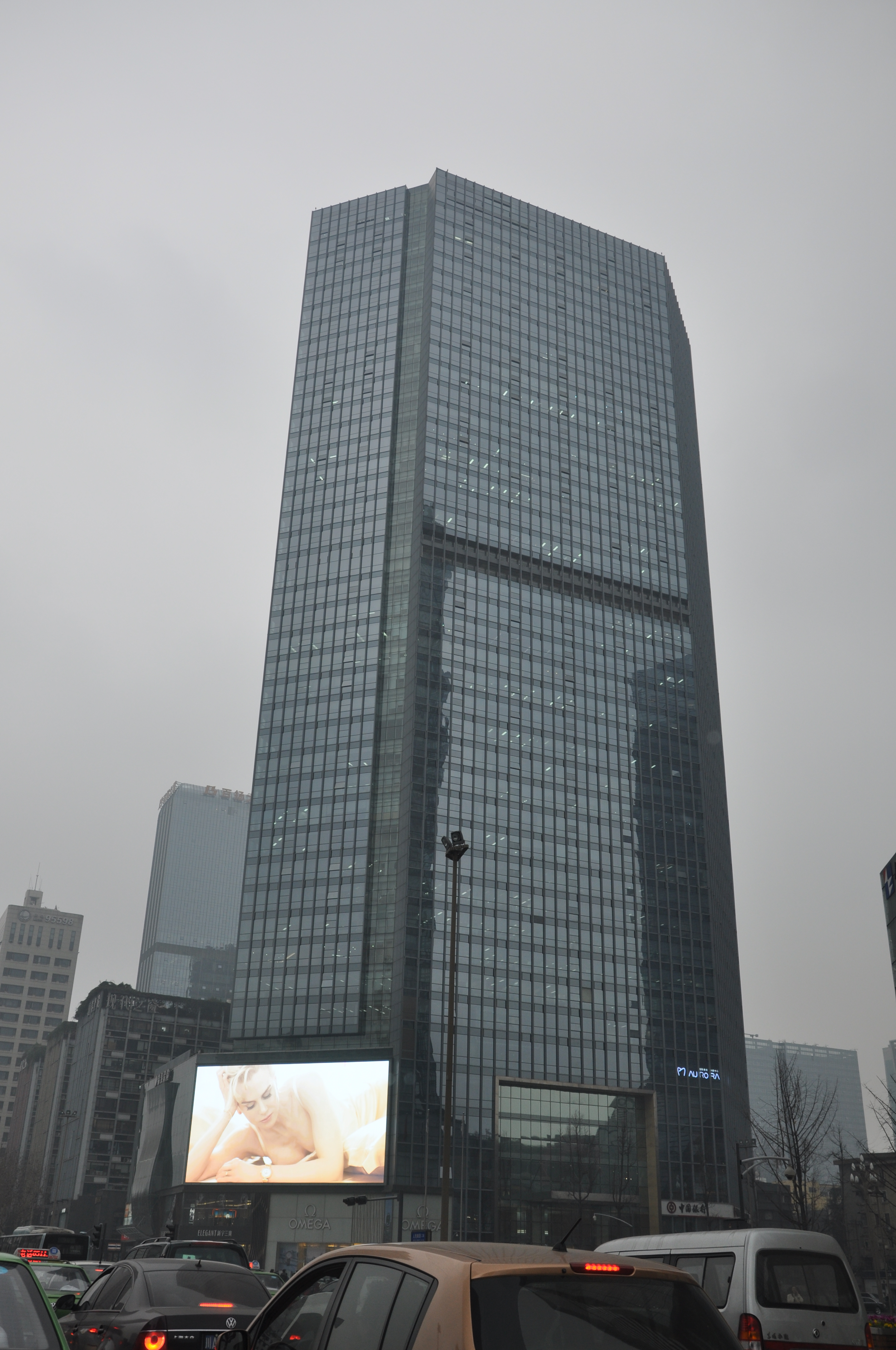 人民南路与锦兴路口 2014/02/26